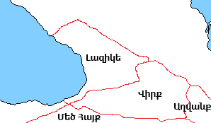 map of Lazika